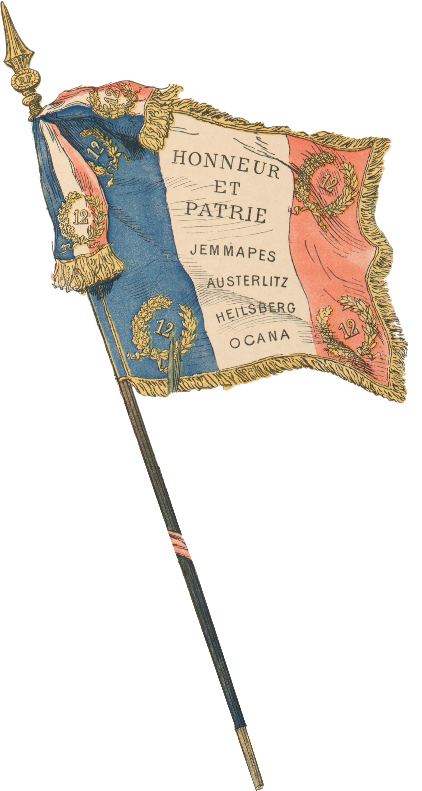 Drapeau du 12e régiment du dragons en 1892